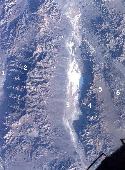 USA-CALIFORNIA/DEATH VALLEY STS073-E-5119 UNITED STATES OF AMERICA, CALIFORNIA/DEATH VALLEY